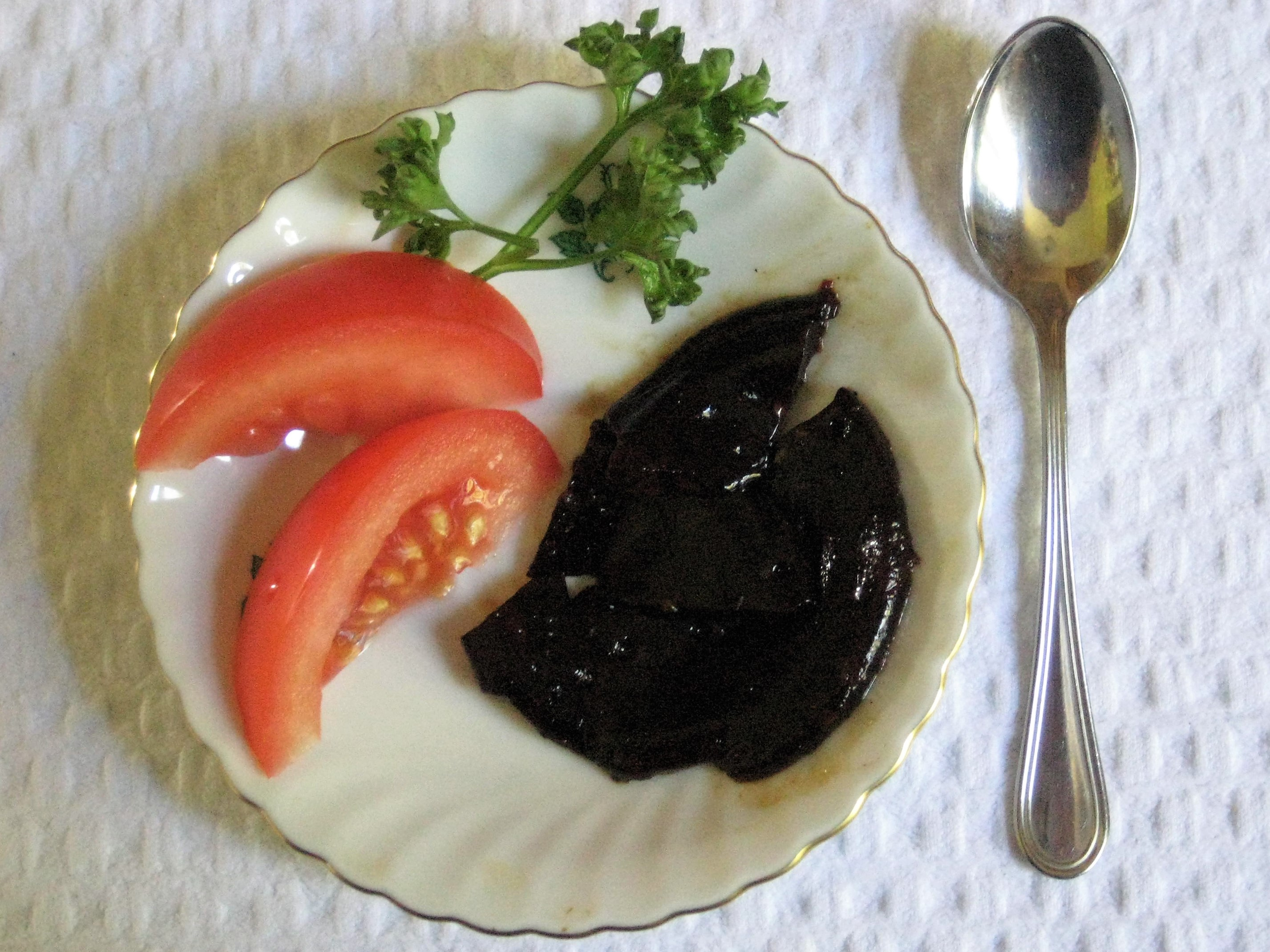 Gelierter Fleischfond (Jus) von einer gebratenen Landente (hier als Beilage zu gebratener, kalter Entenbrust).